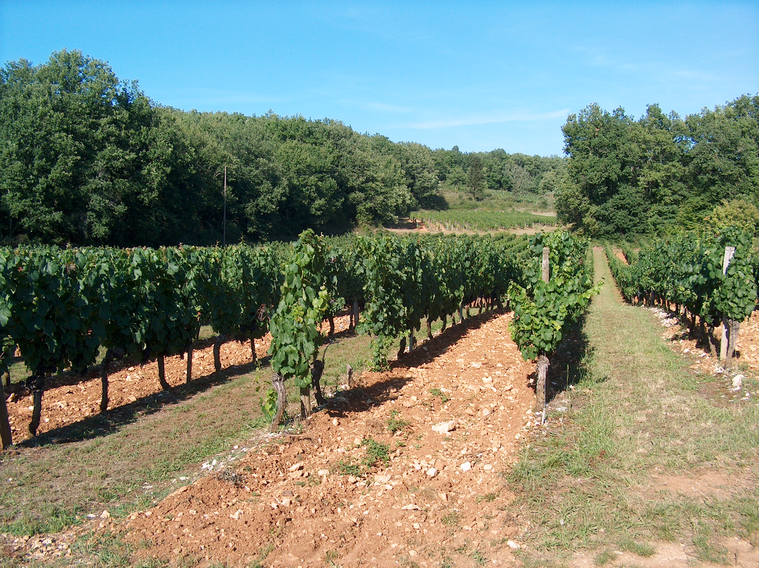 Dans le vignoble de Cahors sur la commune de Luzech, rive droite de la vallée du Lot sur les hauteurs de Luzech quartier FAGES. Une rangée sur deux a été désherbée.